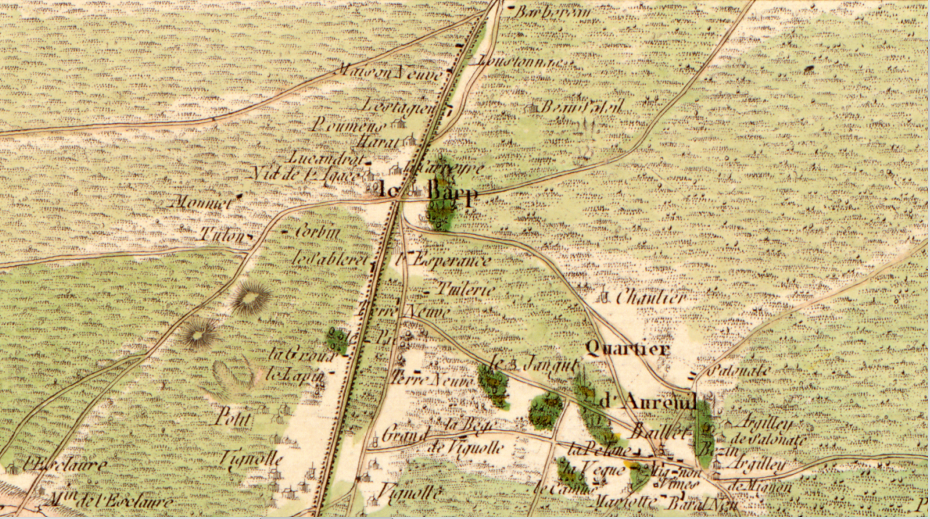 Carte de Cassini n°105 : zoom sur Le Barp, 1756.